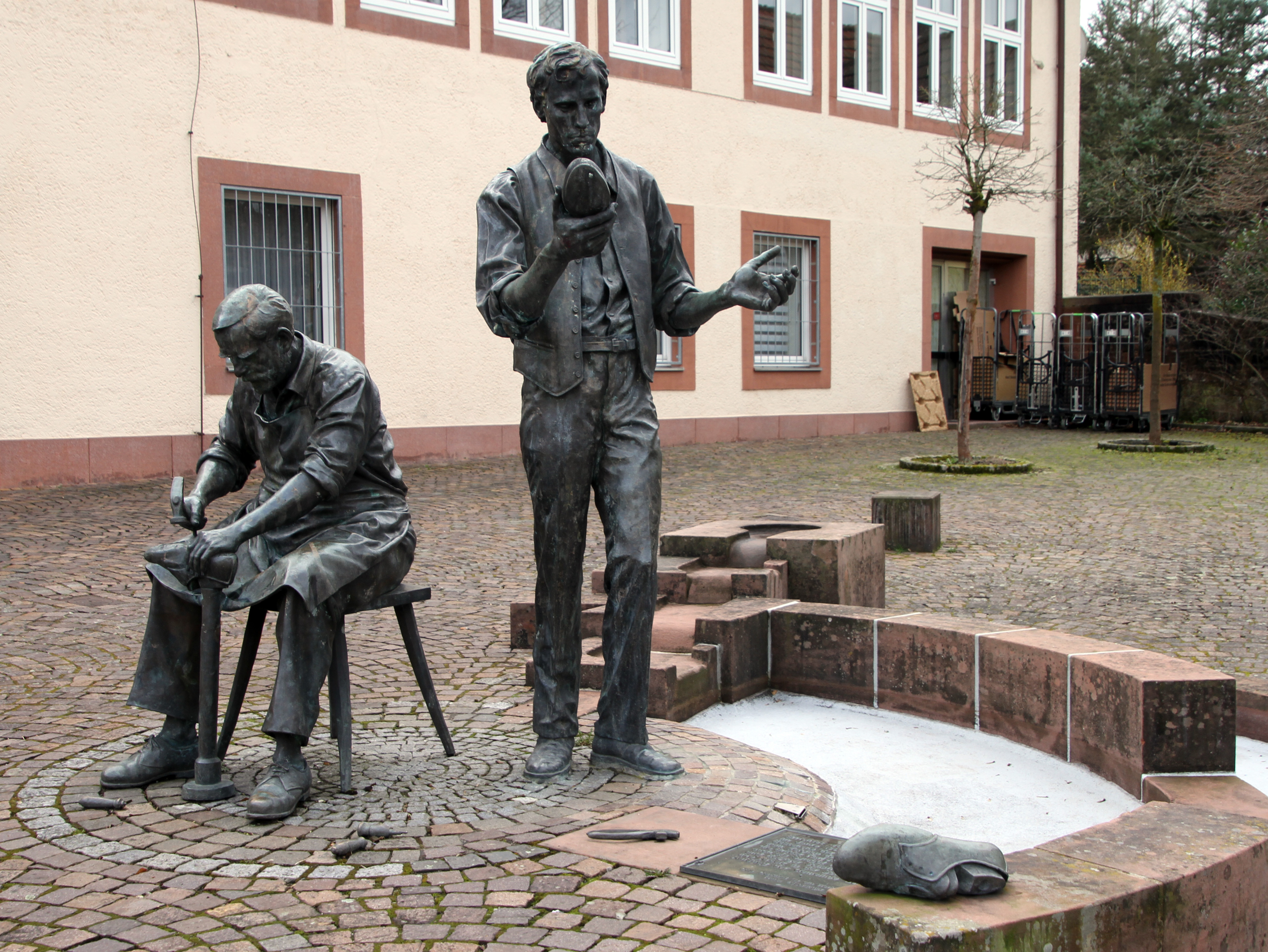 Hauenstein (Pfalz)